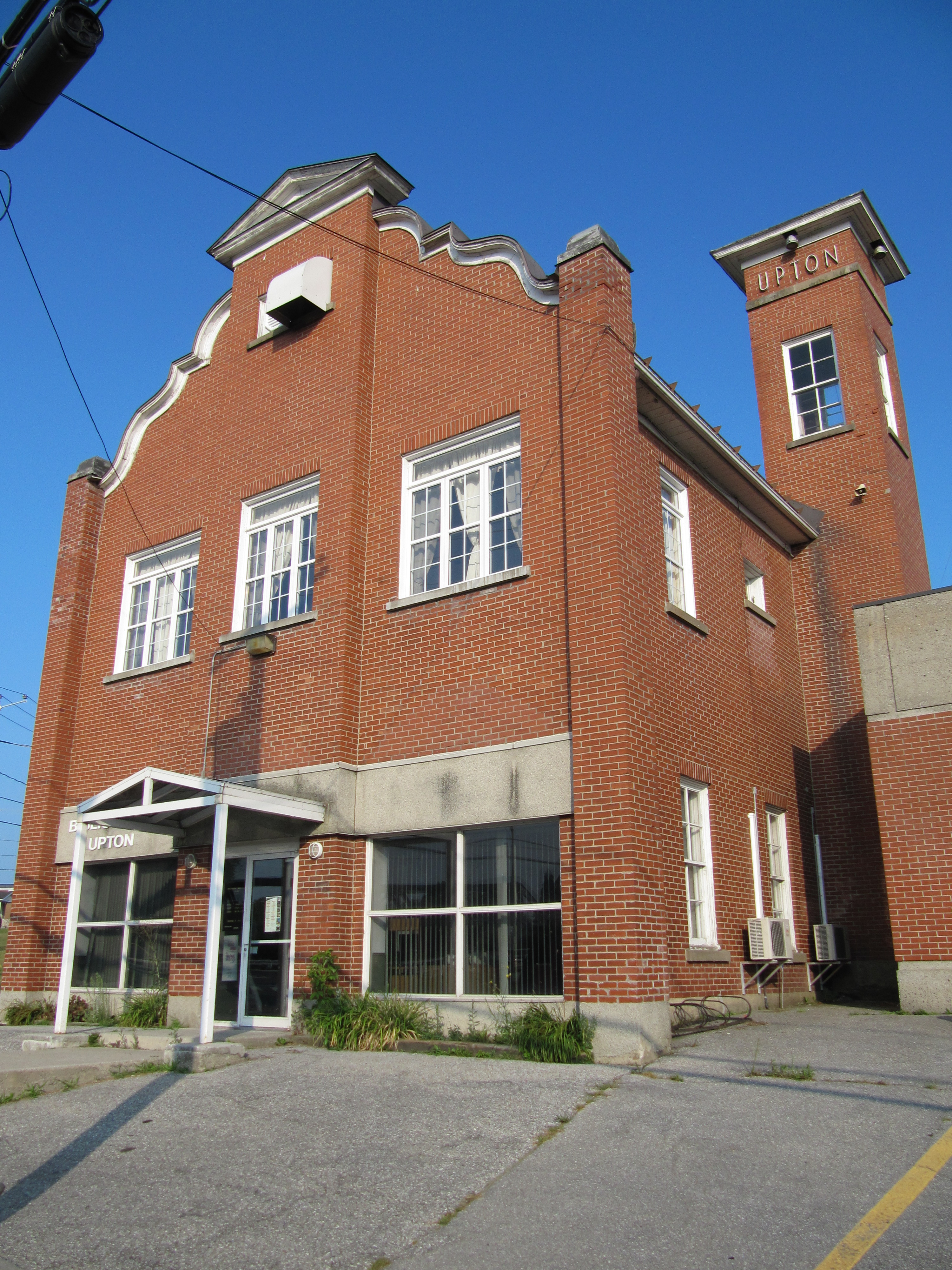 Bibliothèque d'Upton (Québec) avec Service des incendies Vue avant du bâtiment